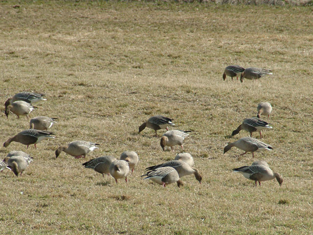 Kortnebbgjess Anser brachyrhynchus